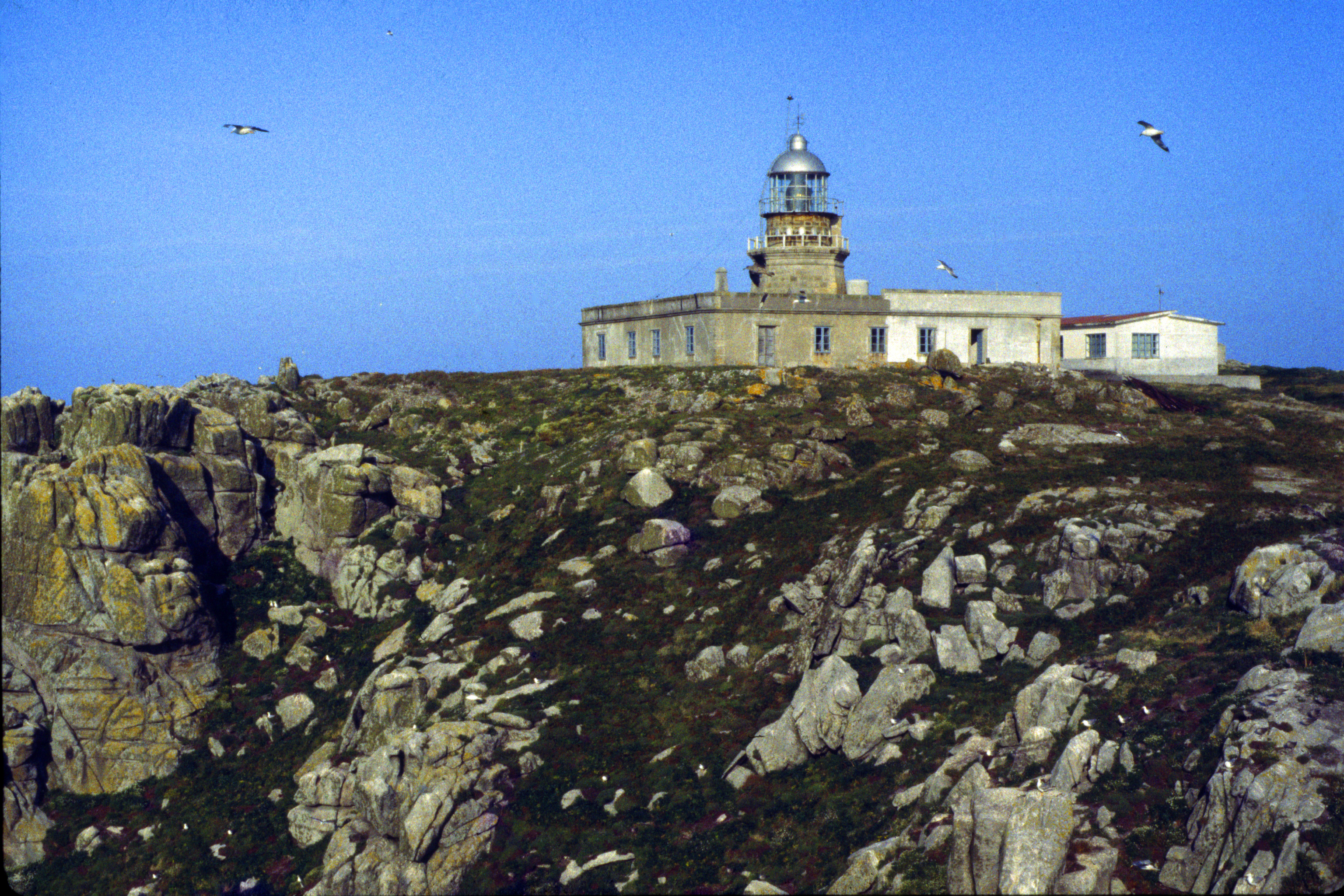 Faro das Sisargas, foto tomada por Ernesto Gomez Fernandez en 1982 desde a vella sirea.